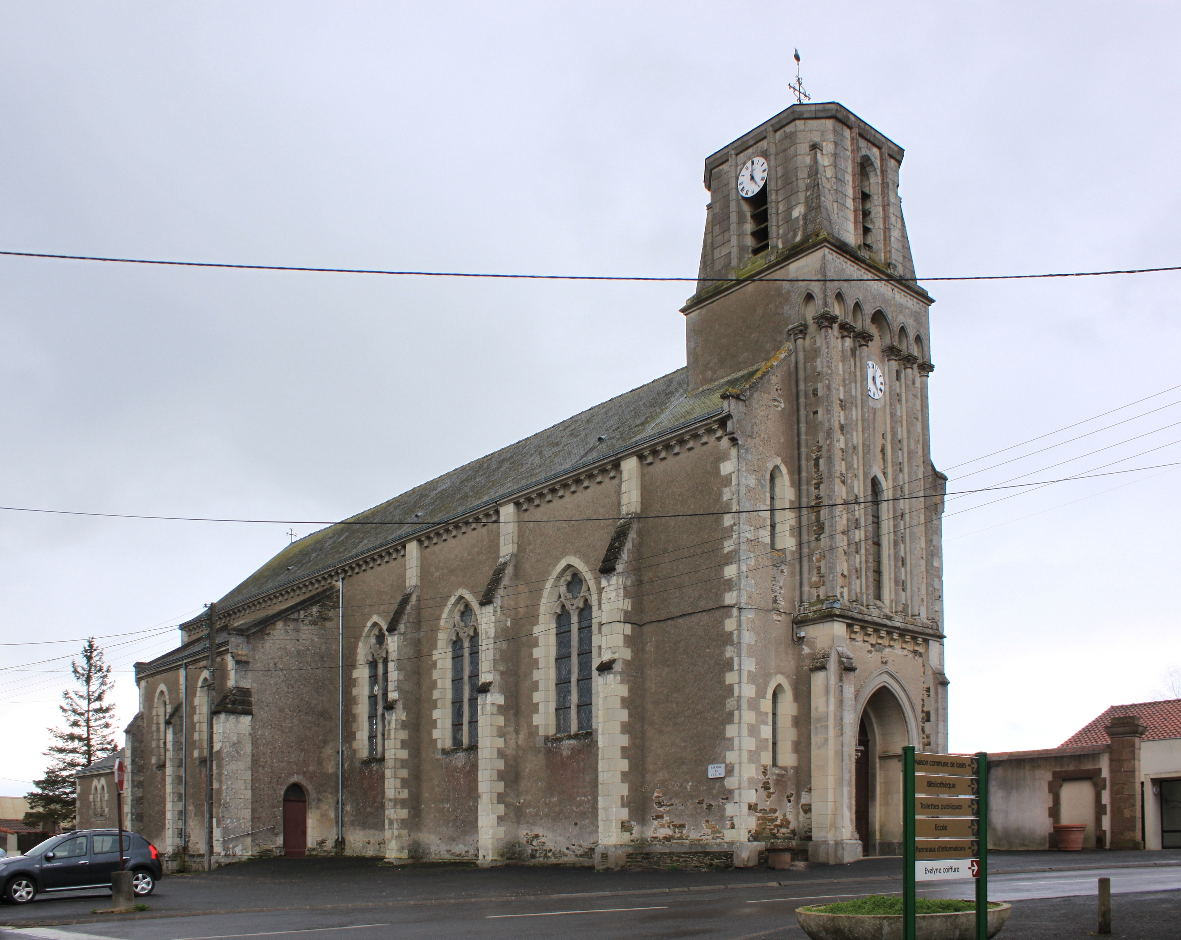 Église Notre-Dame, XIX°, Fr-49-La Chaussaire.